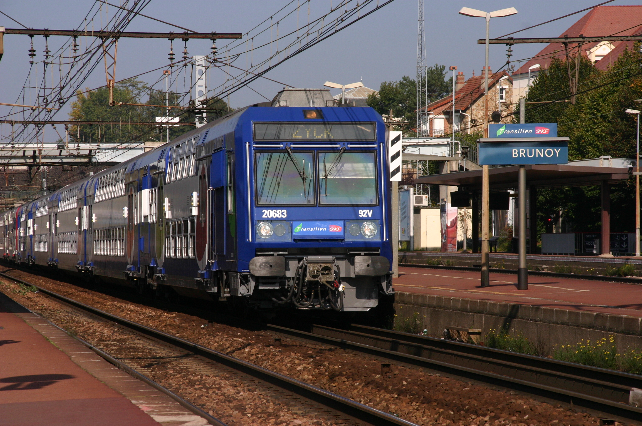 La Gare de Brunoy, Brunoy, département de l'Essonne, France